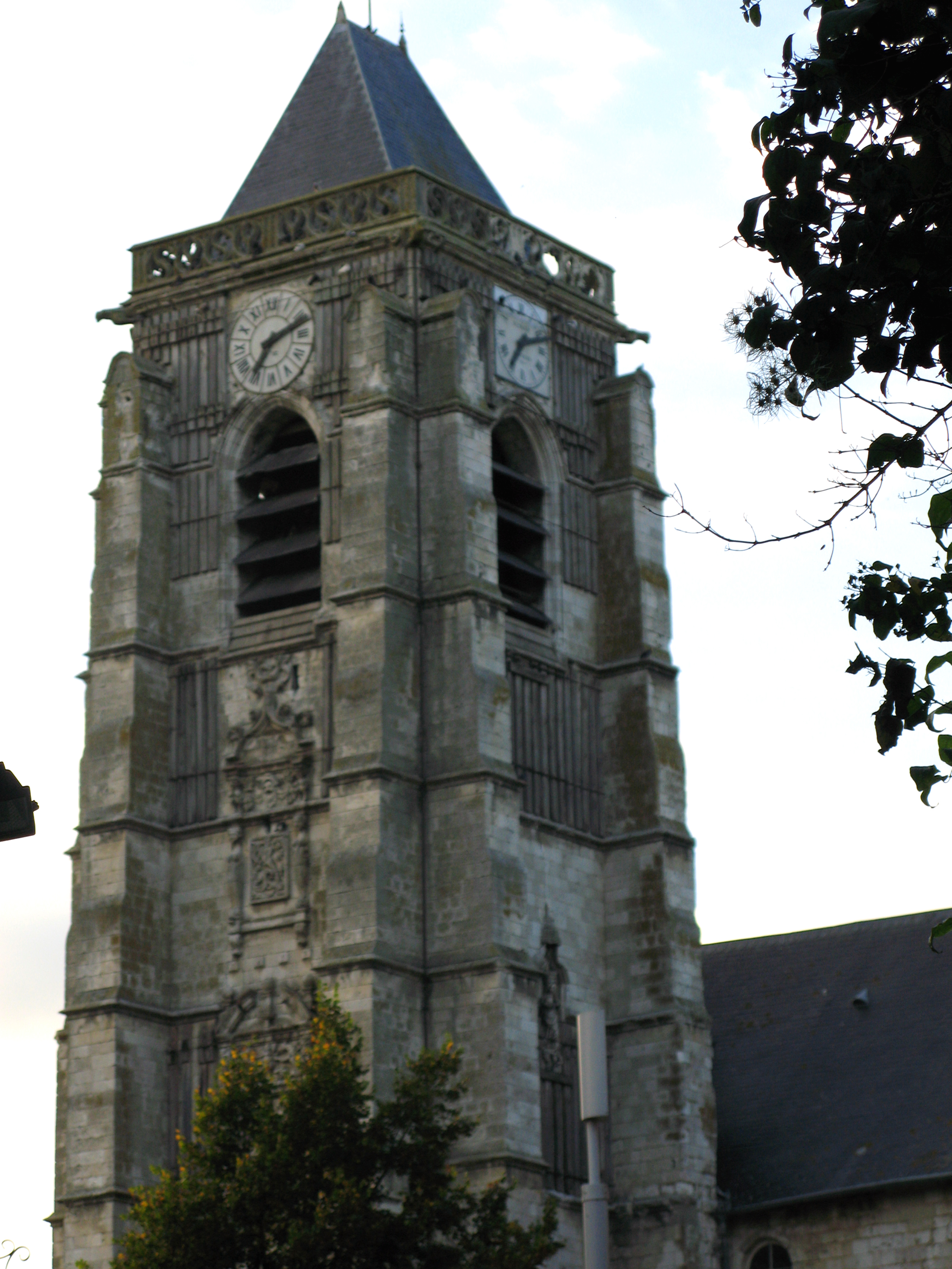 Domart-en-Ponthieu (Somme, France) - Le clocher de l'église.